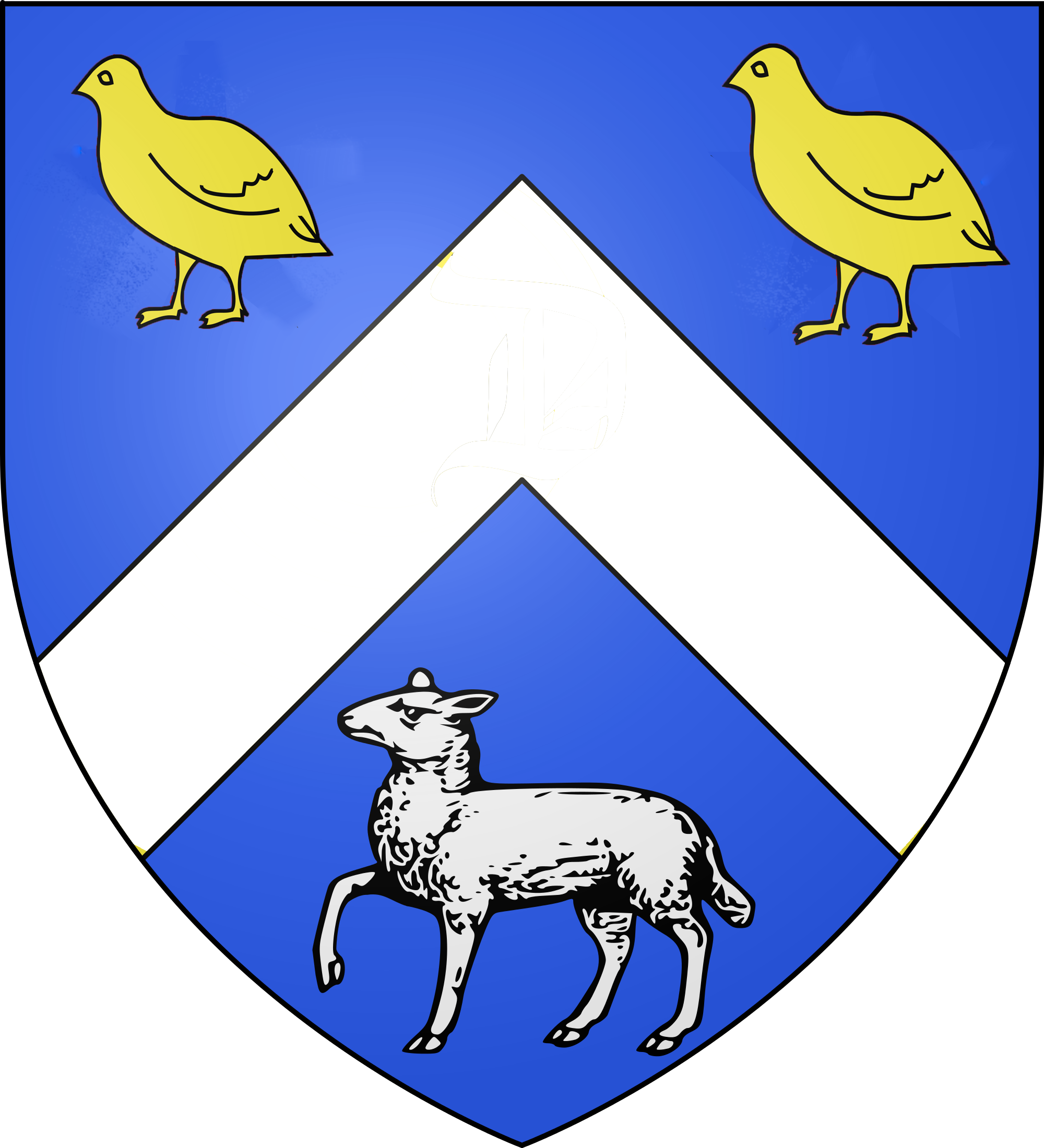 Blason de champagne in De Caumartin